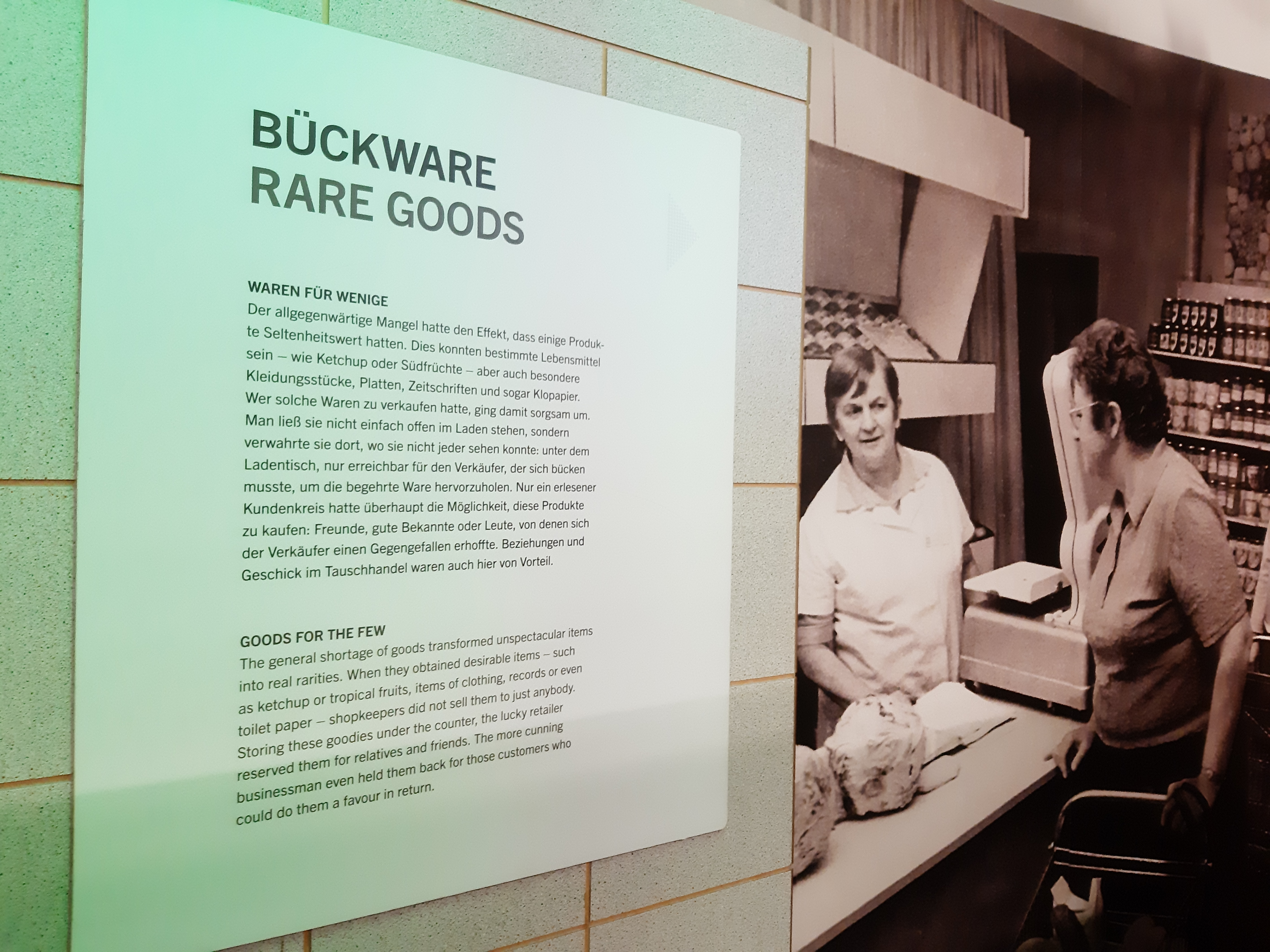 Tafel zur Erklärung des Begriffs "Bückware" und historisches Foto einer typischen Verkaufssituation in der DDR im Hintergrund